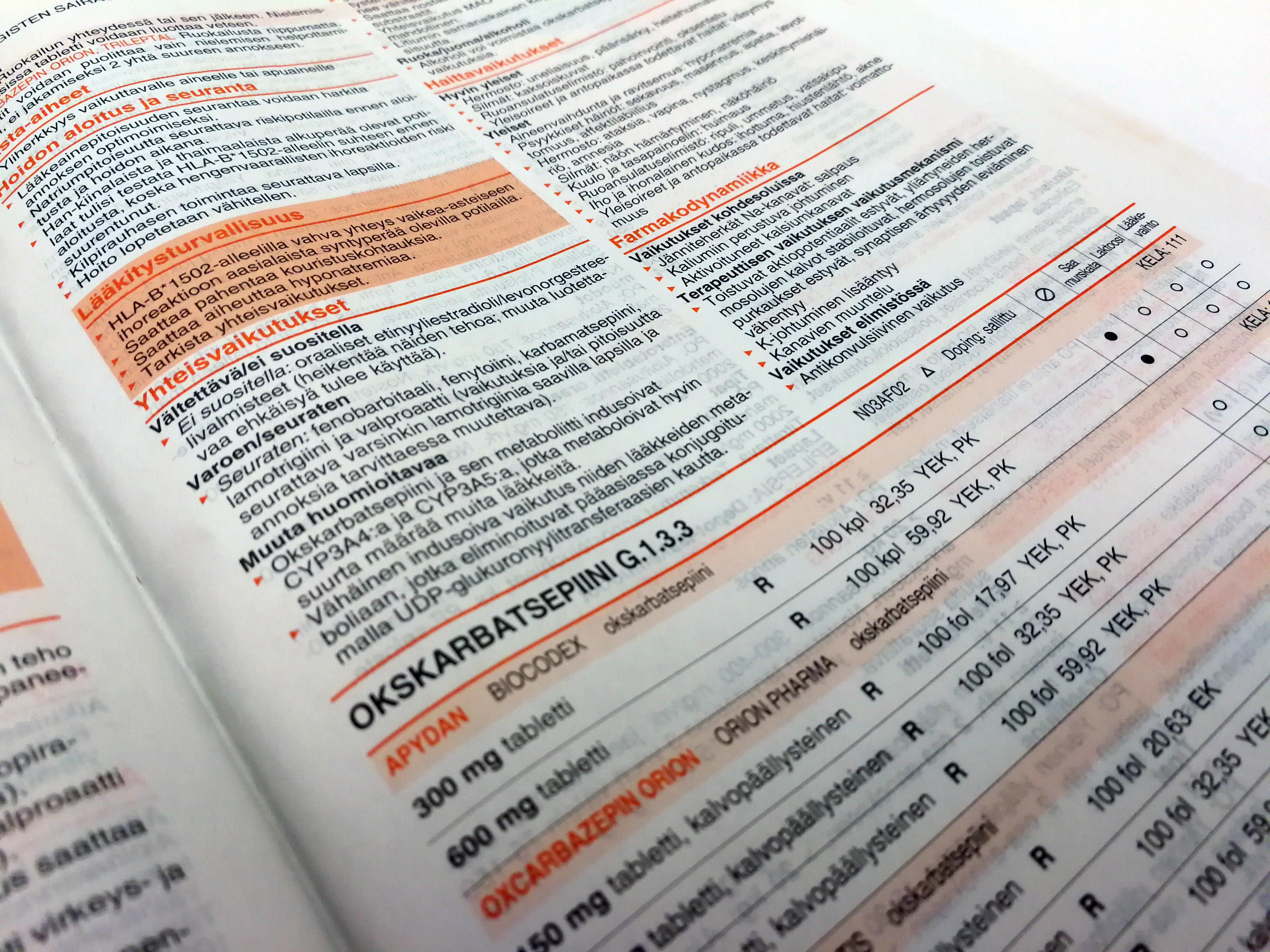 Pharmaca Fennica 2018